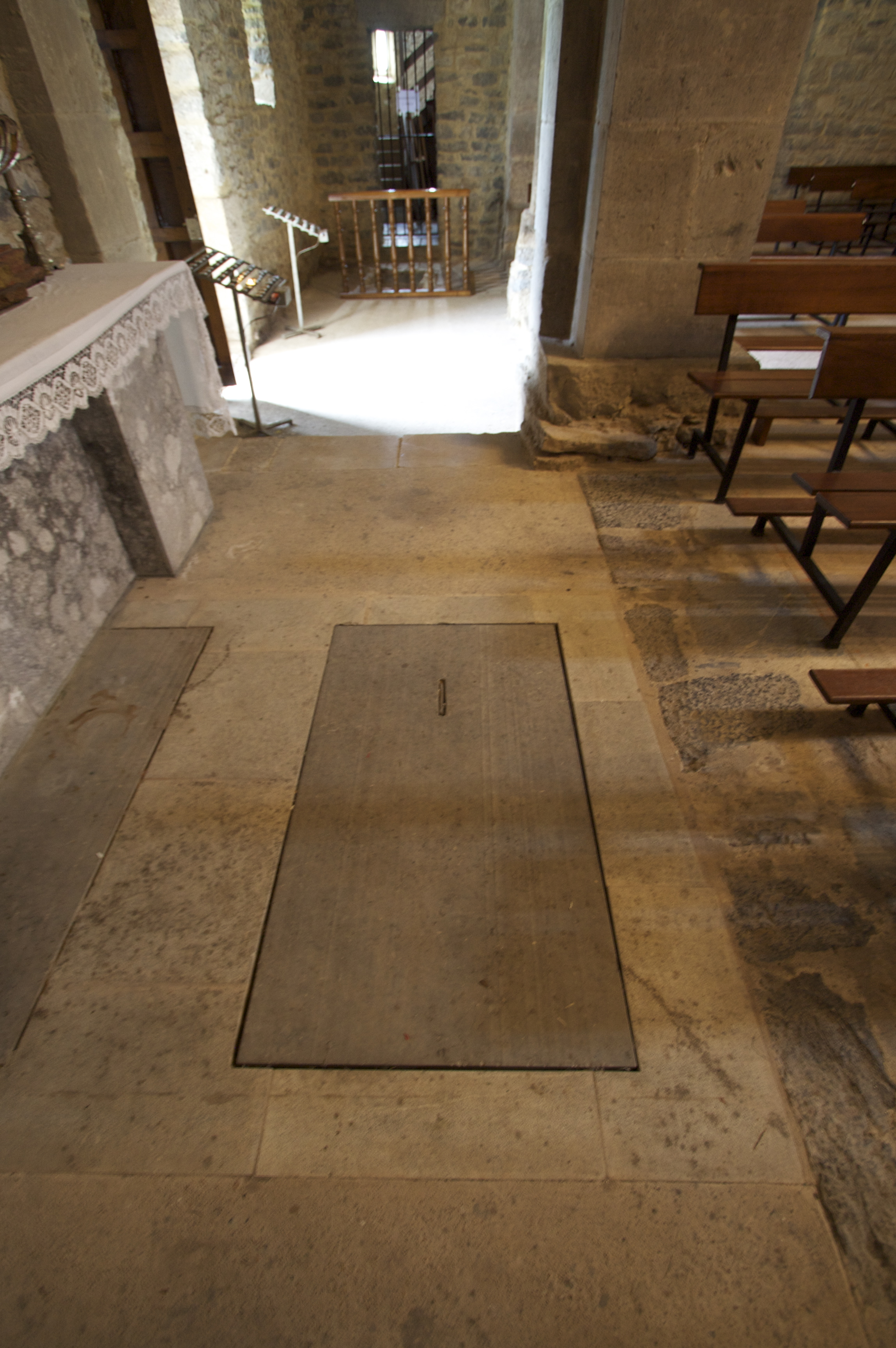 Lugar en el que se depositaron los restos encontrados en el panteón regio situado en el nártex de la iglesia prerrománica de Santianes de Pravia del siglo VIII. Se cree que pertenecen a los reyes Silo y Adosinda